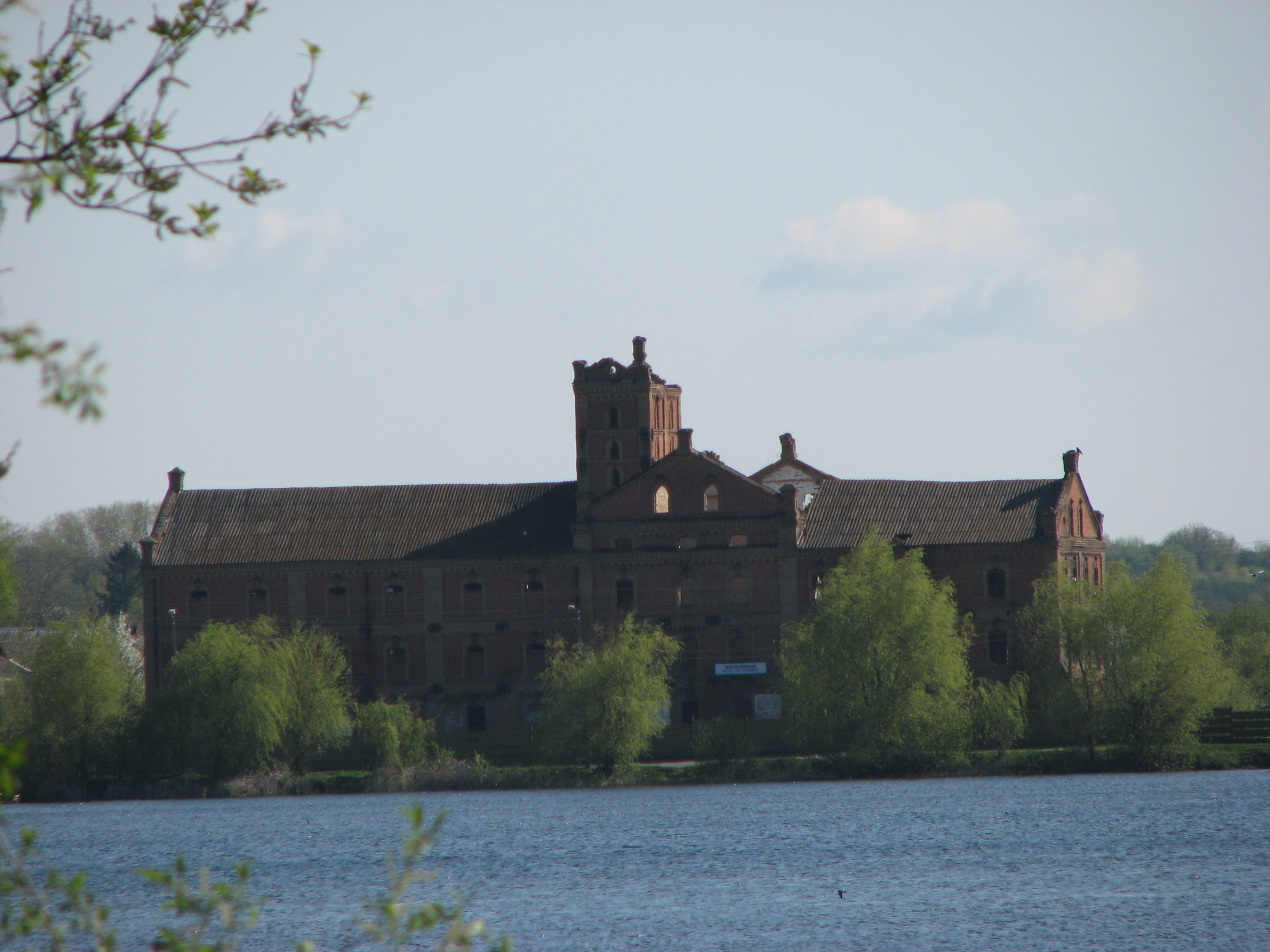 Старокостянтинів. Старий млин.